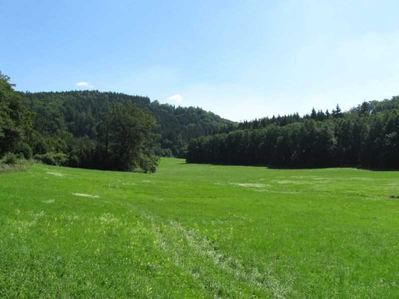 Rakovecké údolí